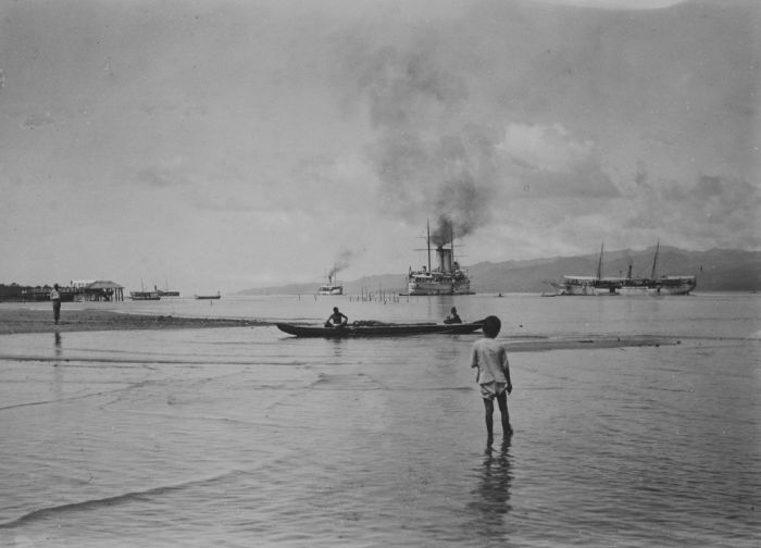 foto. De Hr.Ms. Zeeland en andere stoomschepen in de Baai van Ambon op de Molukken